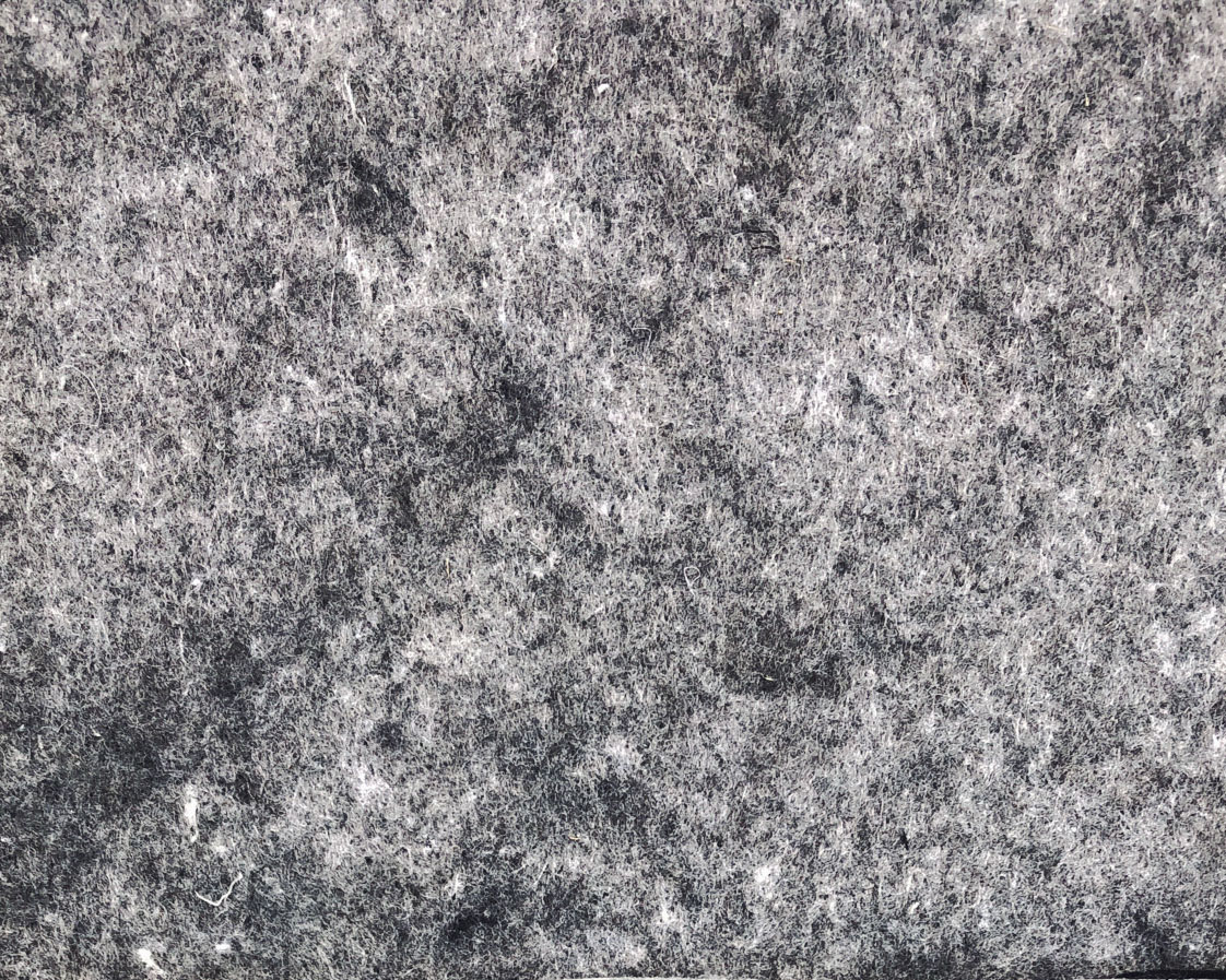 Geotextil com algodao